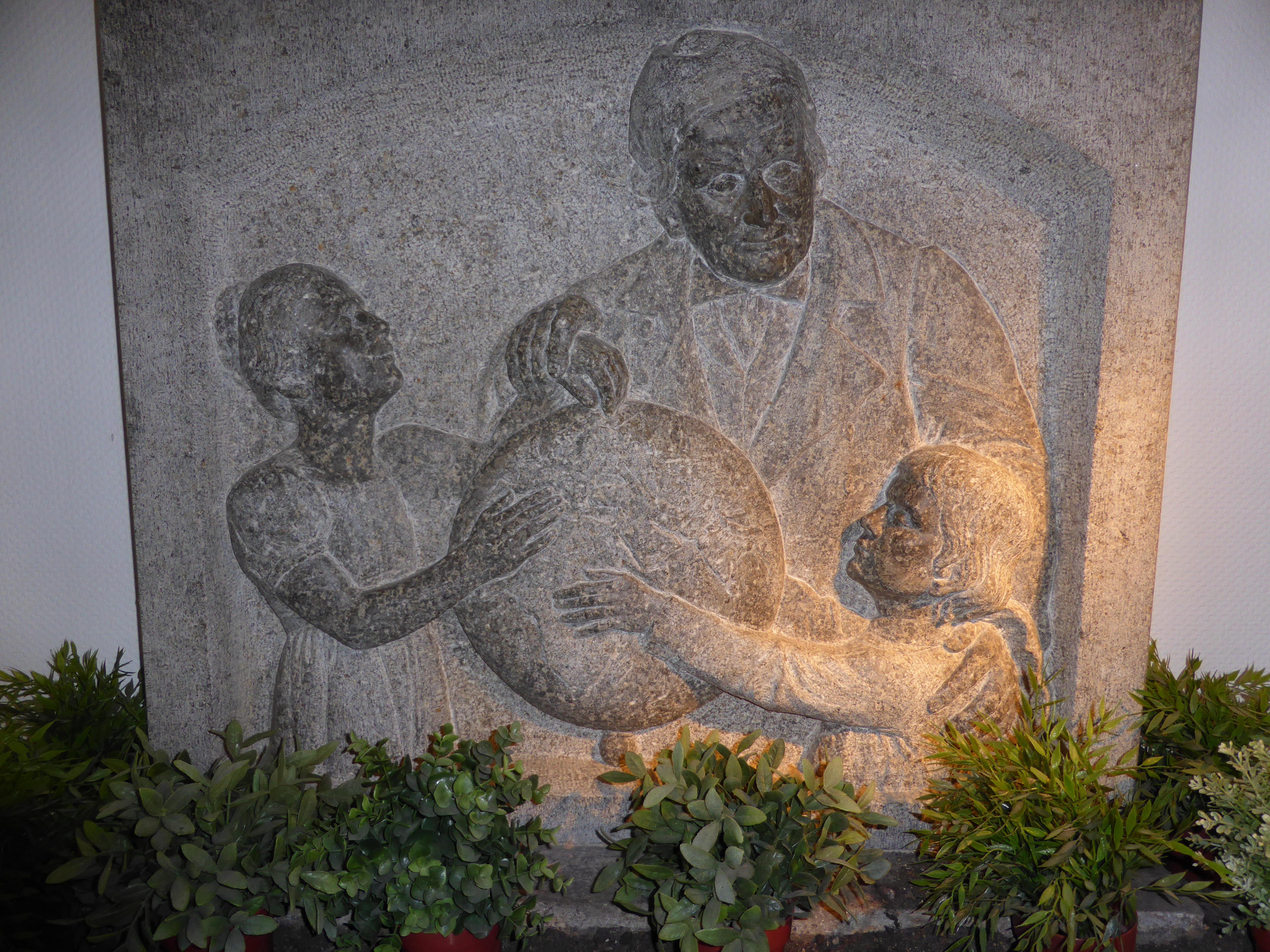 Angeschafft zur 100-Jahr Feier der Berliner Blindenschule am 13. Oktober 1906